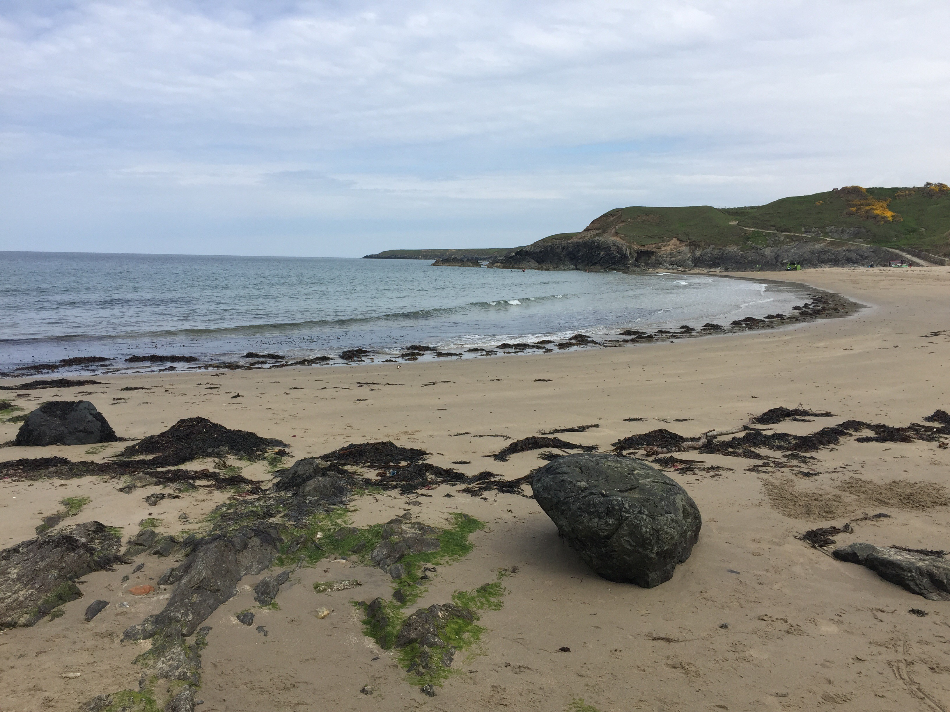 Traeth Tywyn, yn gwynebu'r gogledd.